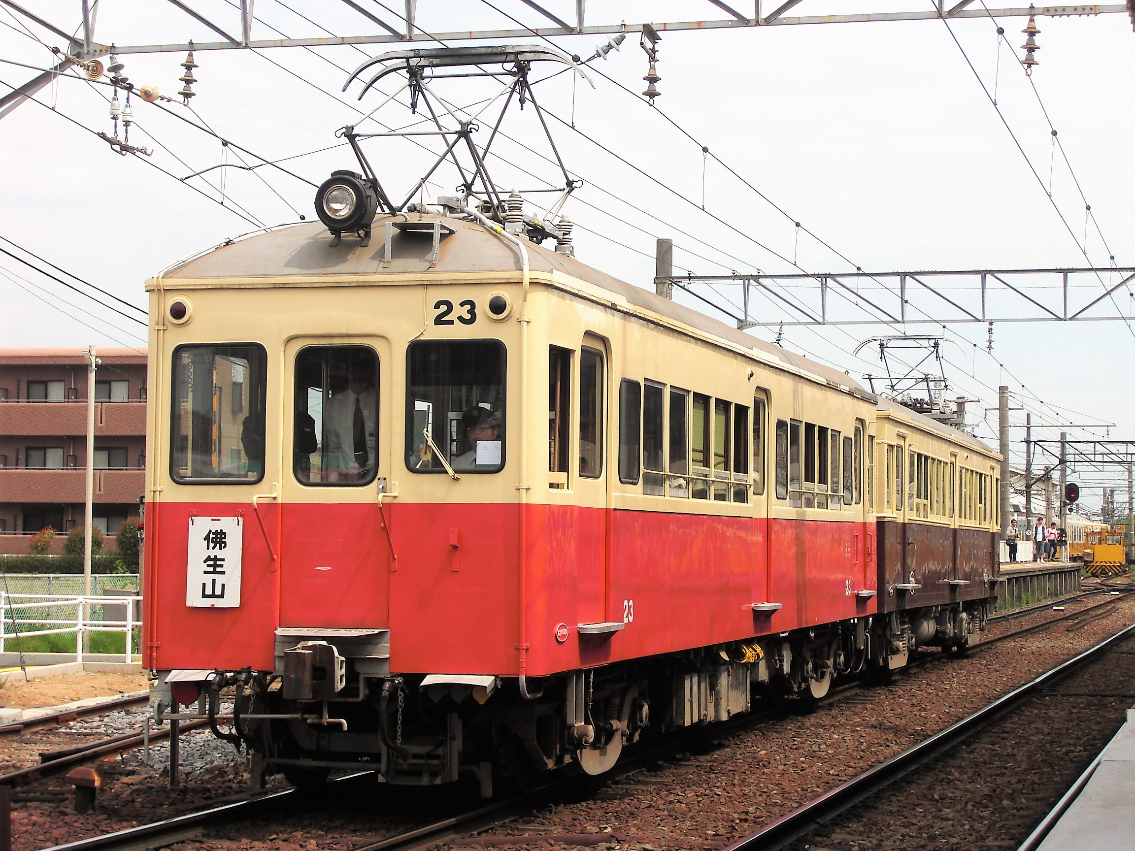 高松琴平電気鉄道20形電車23号